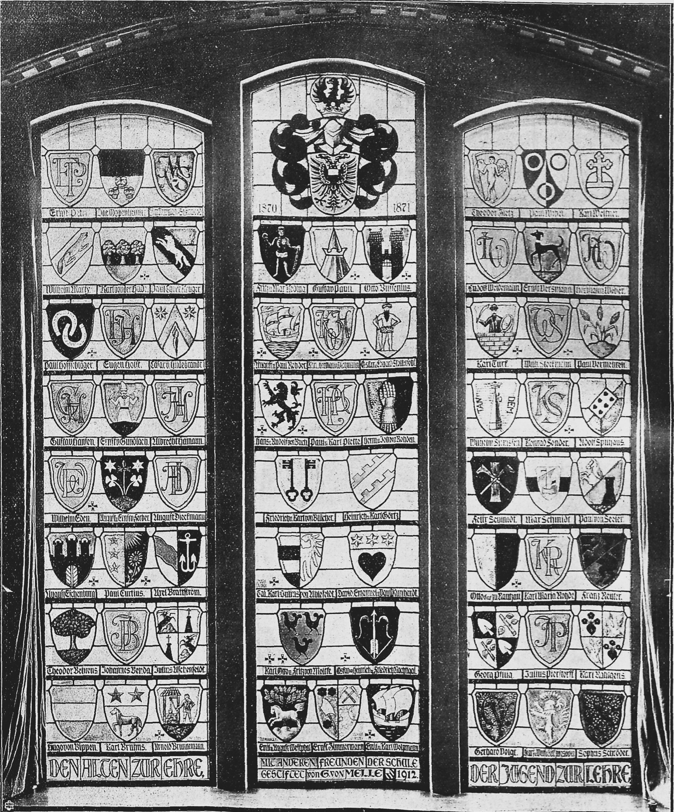 Das von Melle gestiftete bunte Glasfenster in der Aula des Katharineums. Inshrift: „Den Alten zur Ehre, der Jugend zur Lehre.“